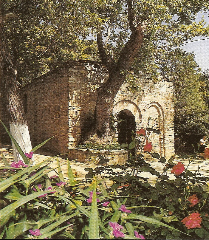 Meryemana, angebliches Sterbehaus der Mutter Maria bei Ephesos, Westtürkei